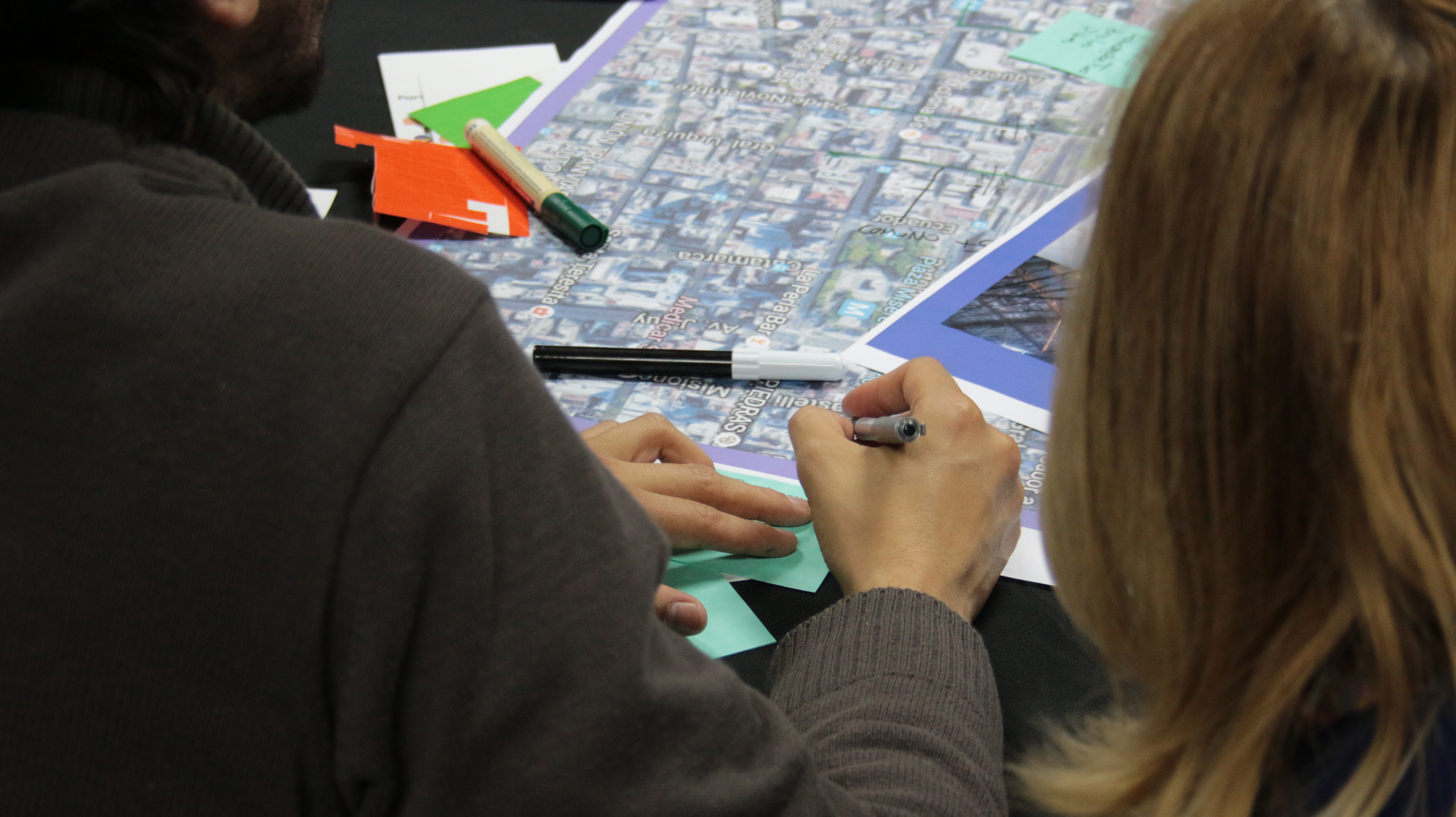 Actividad de Cocreación con vecinos del Parque de la Estación realizada por la DG Antropología Urbana de la Subsecretaría de Proyectos del Ministerio de Desarrollo Urbano y Transporte del GCBA